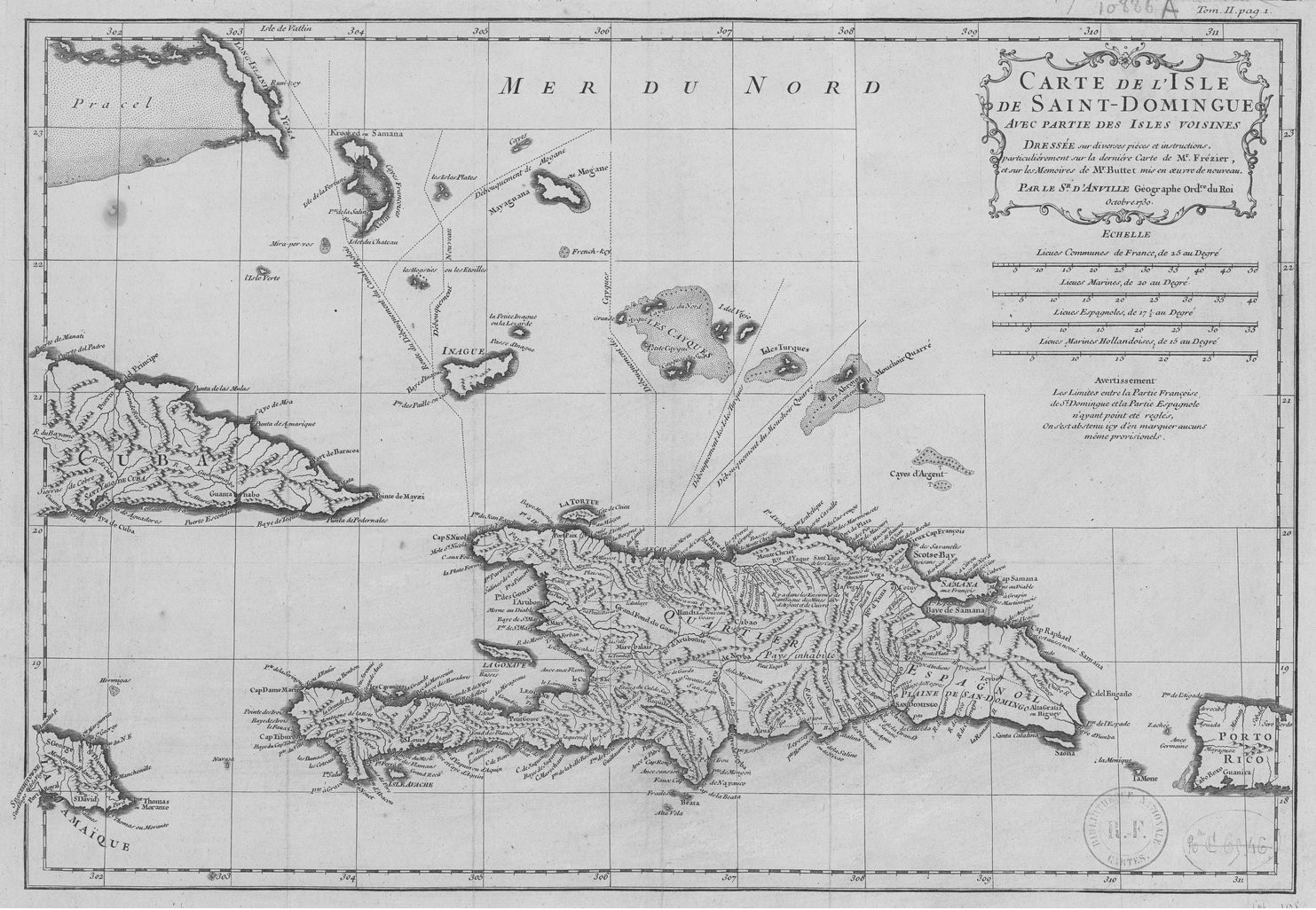 Jean-Baptiste Bourguignon d'Anville, Pierre-François-Xavier de Charlevoix.- Carte de l'isle de Saint-Domingue avec partie des isles voisines, dressée sur diverses pièces et instructions particulièrement sur la dernière carte de Mr Frézier et sur les mémoires de M. Buttet, mis en oeuvre de nouveau par le Sr d'Anville, Chez l'Auteur, Paris, 1730